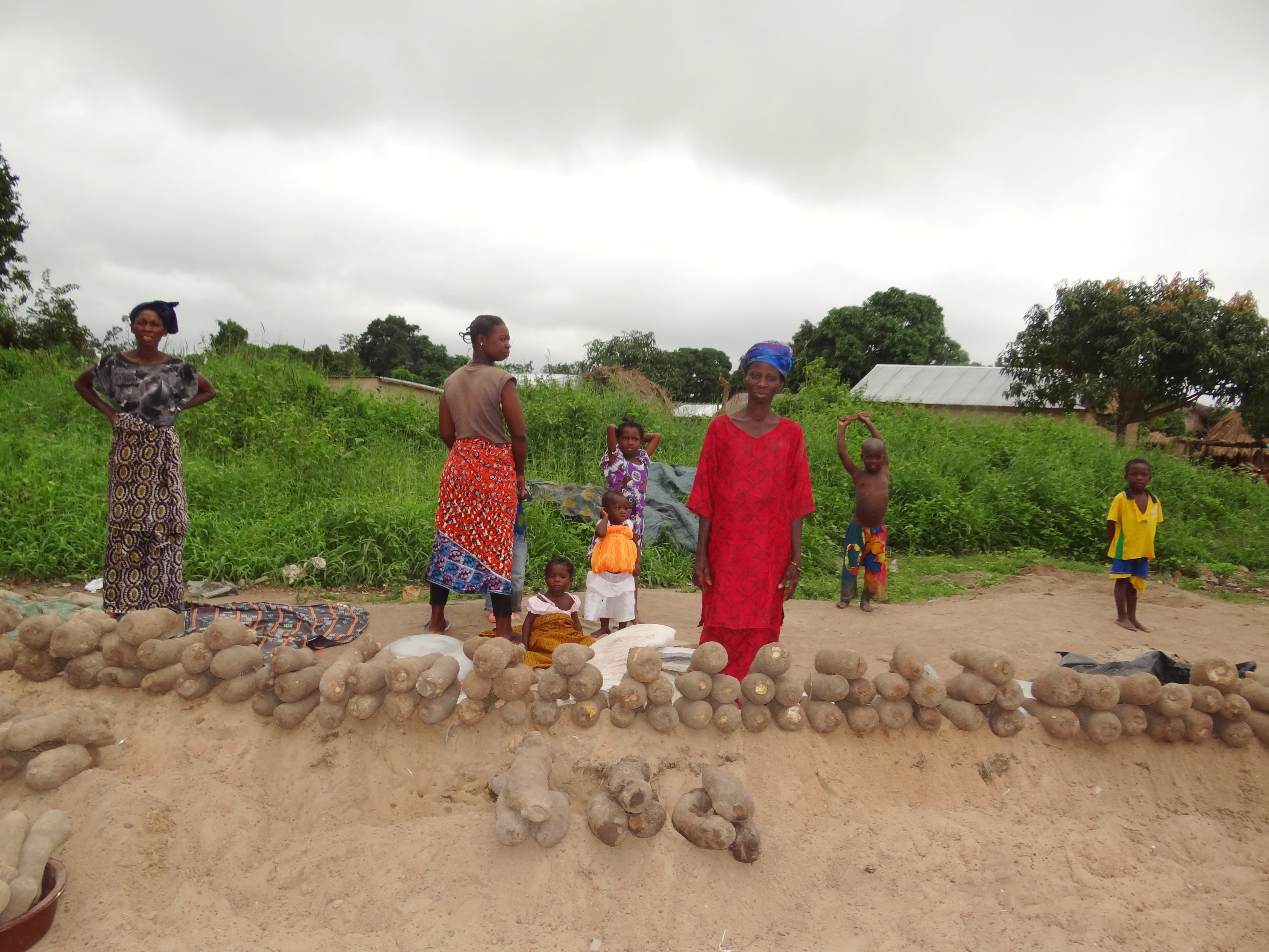 נשים מוכרות יאם הכניסה לכפרם. . הכפר שוכן על הדרך העוברת בצמוד ומדרום לפארק הלאומי קומואה This is an image of food from Ivory Coast